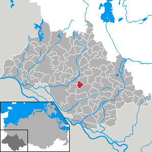 Groß Krams in Mecklenburg-Vorpommern - district Ludwigslust